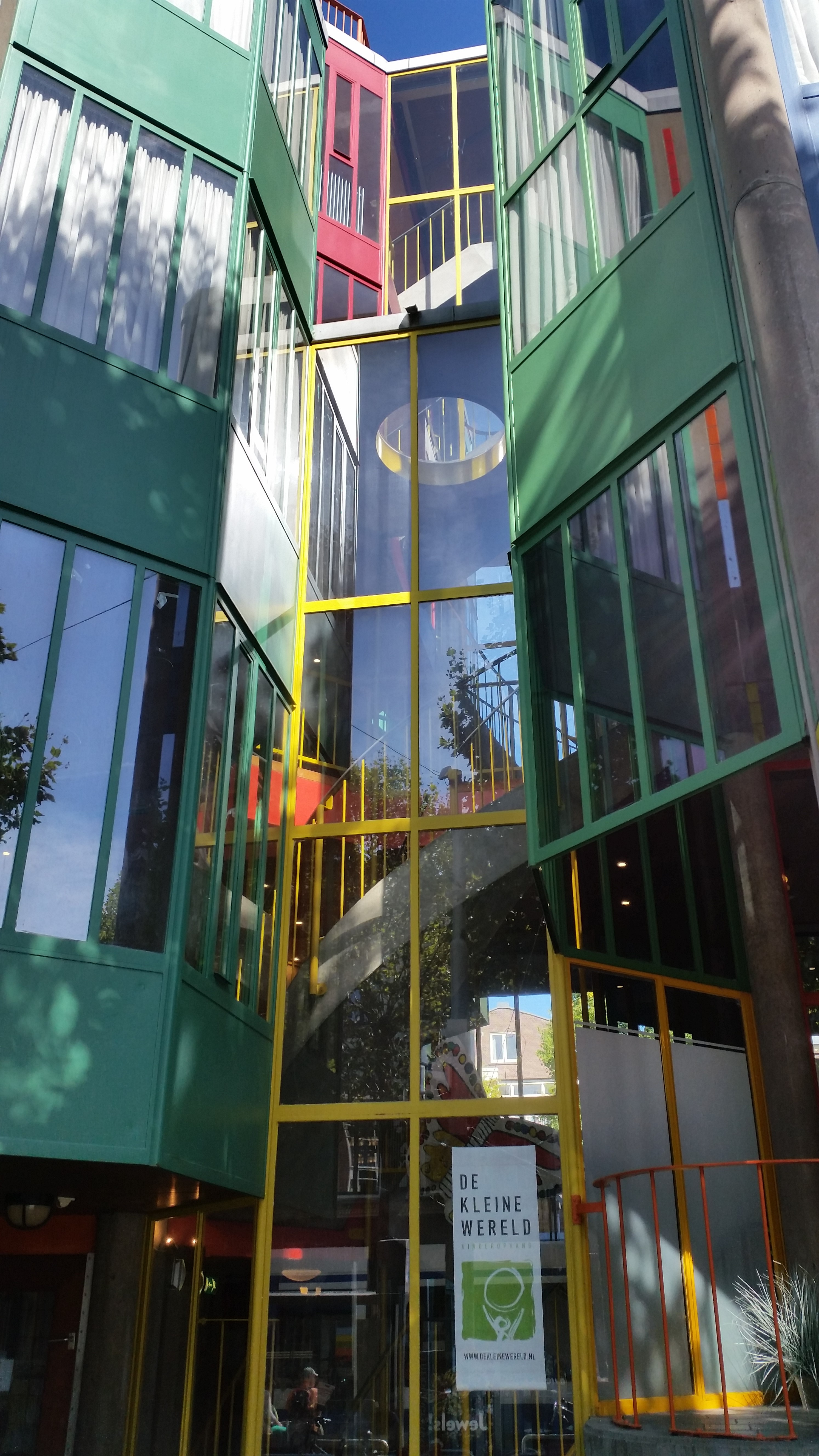 Nieuwbouw Hubertushuis Plantage Middenlaan 33, Amsterdam